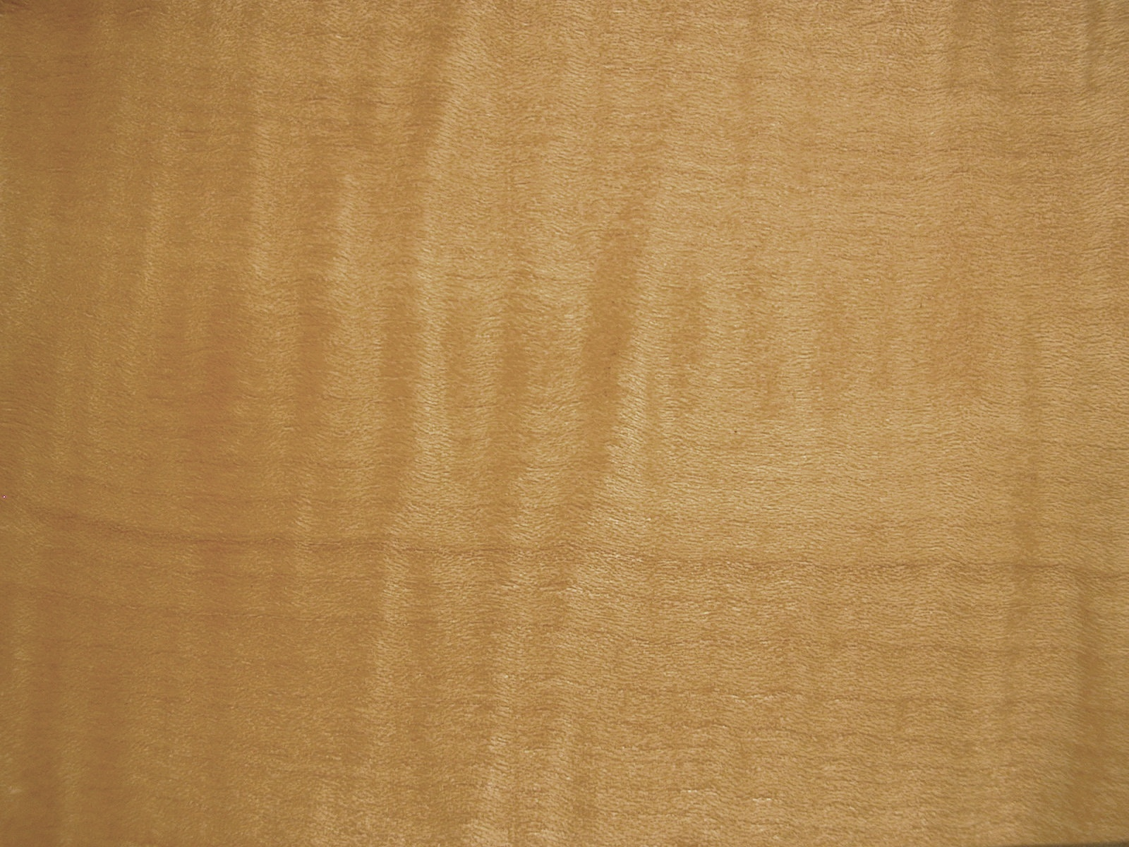 Furnier des Riegelahorn, gemessert, geölt, nicht geschliffen Fotgraf: Philipp Zinger